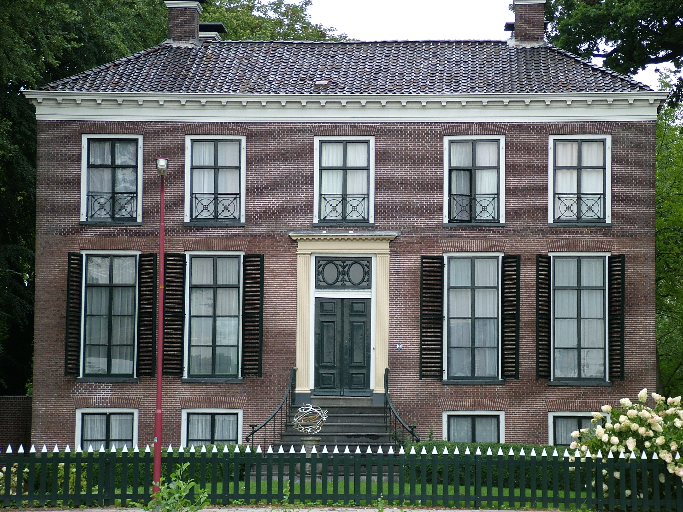 Huize Voormeer